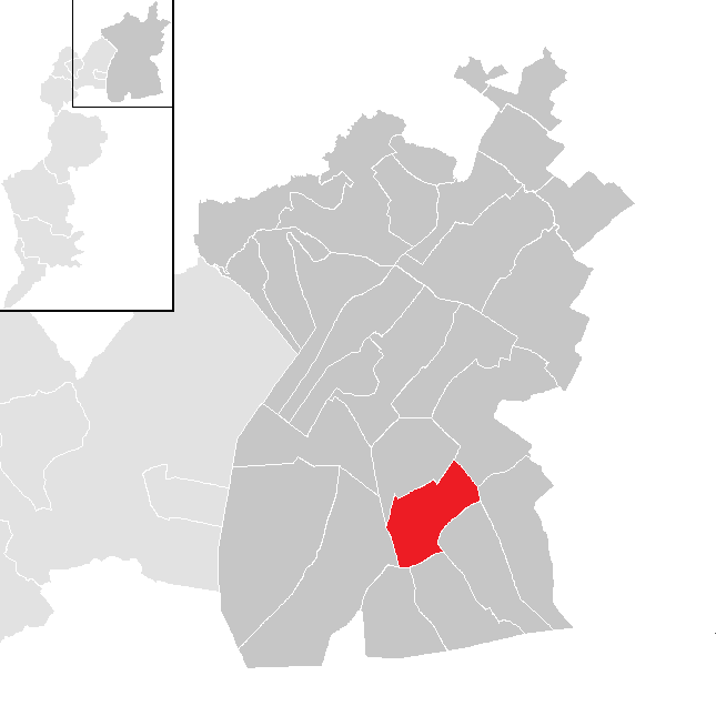 Bezirk Neudsiedl am See